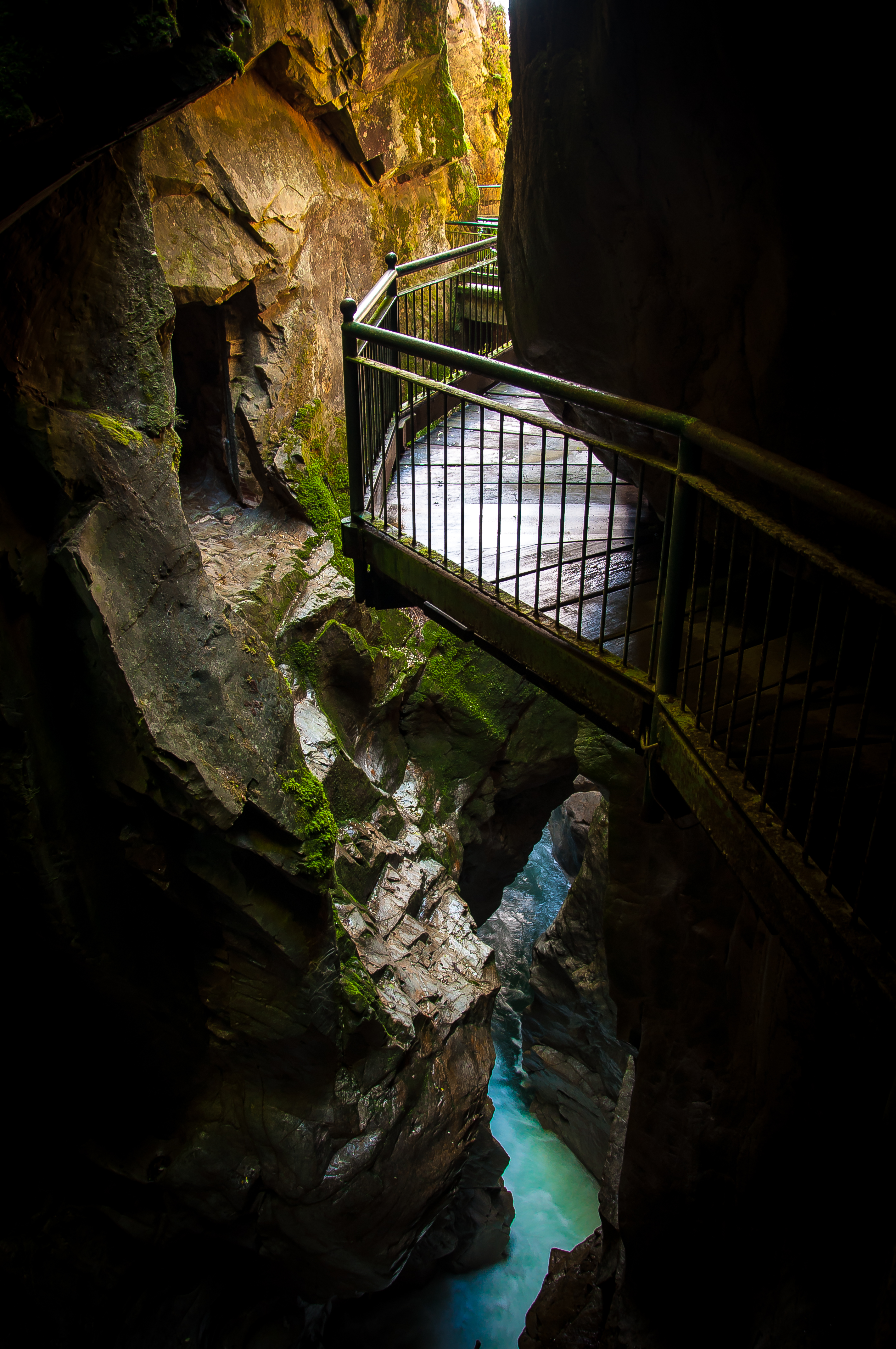 Gola del torrente Pioverna a Bellano (LC)